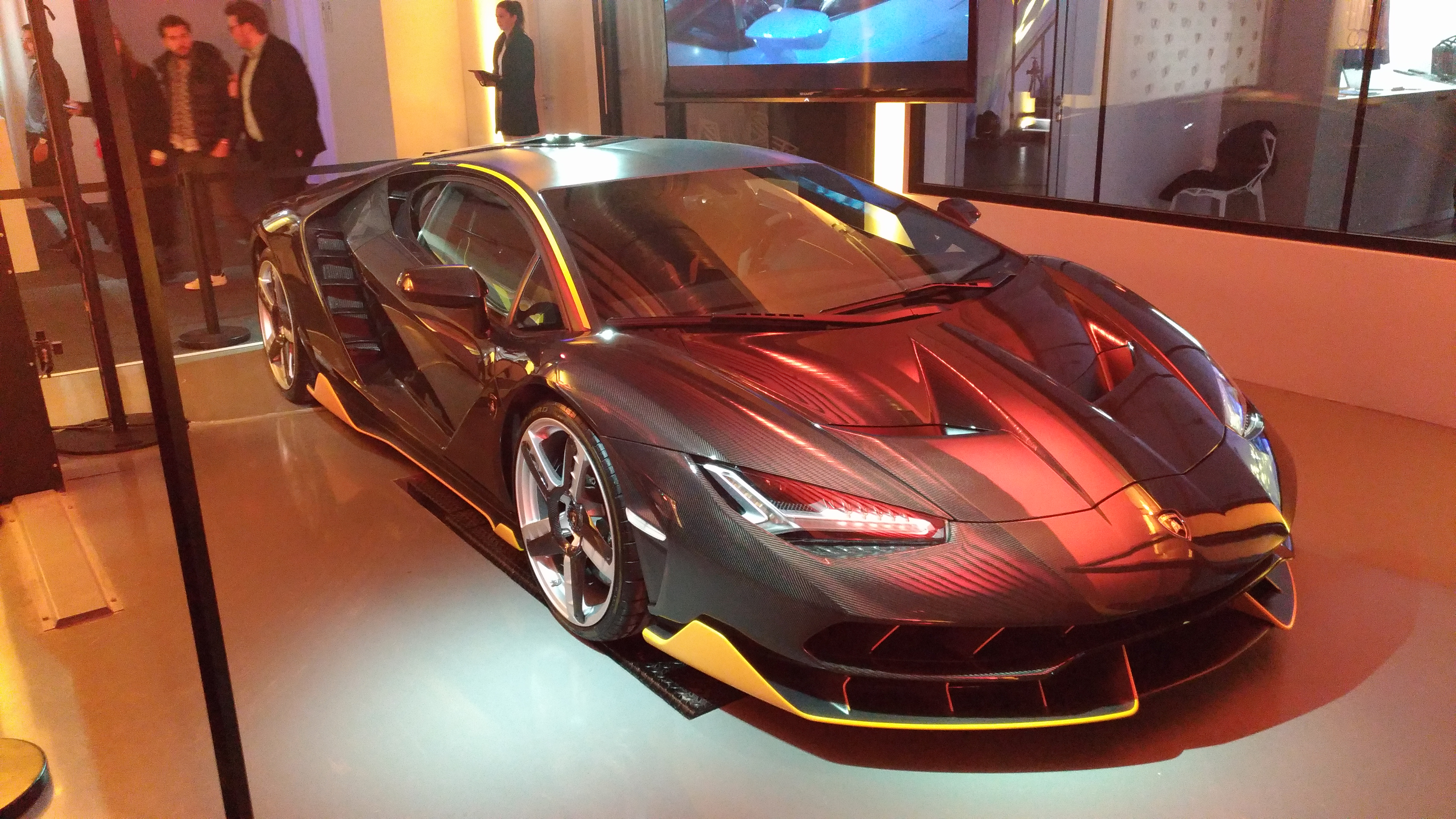 Lamborghini Centenario à l'inauguration de la concession Lamborghini Paris, groupe Schumacher